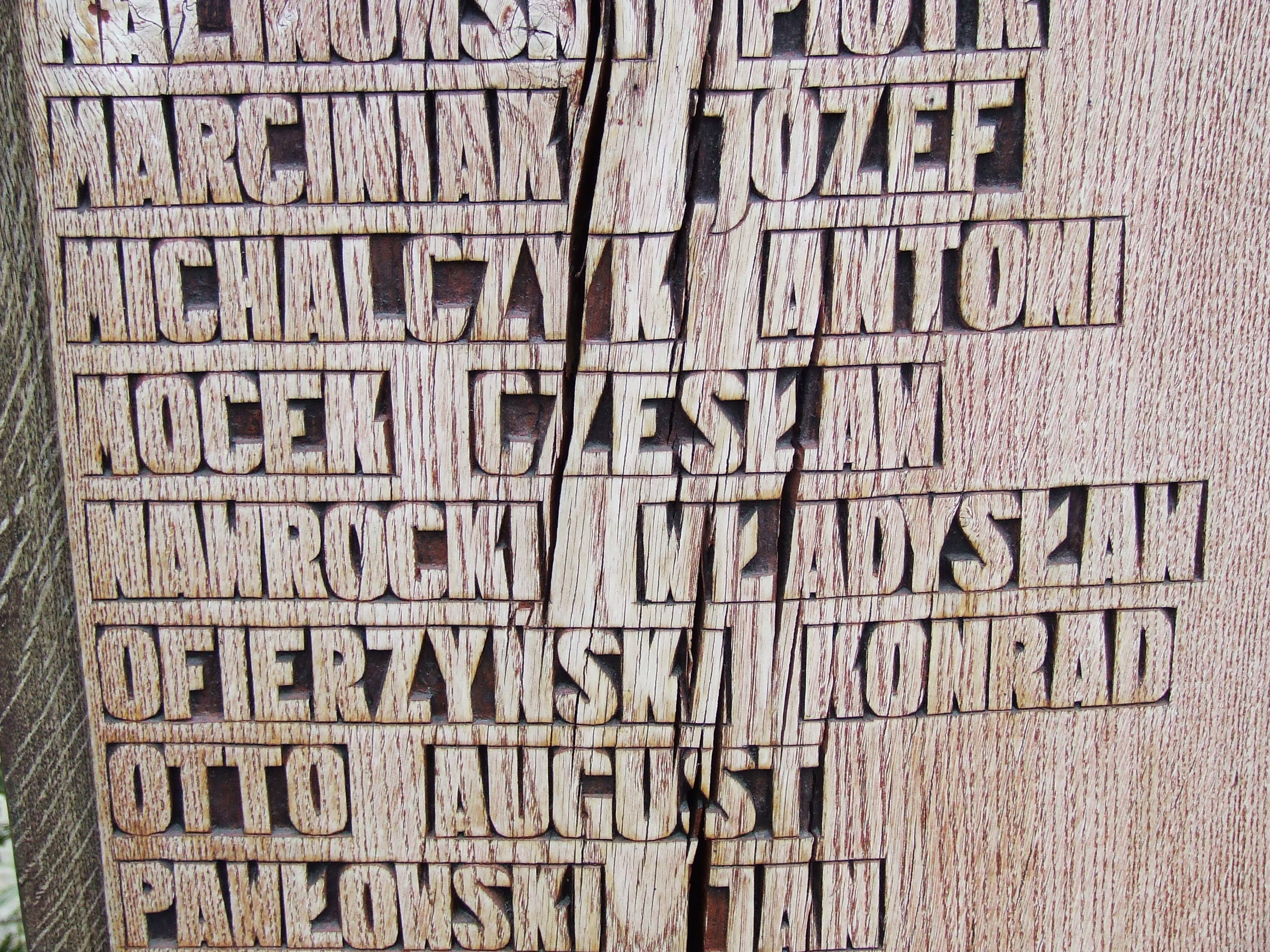 napis na Krzyżu Katyńskim w Krotoszynie